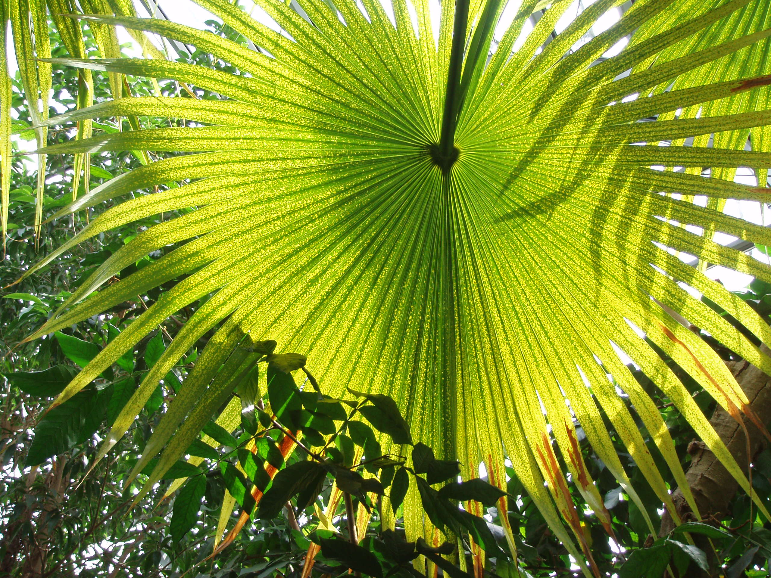 in der Wilhelma